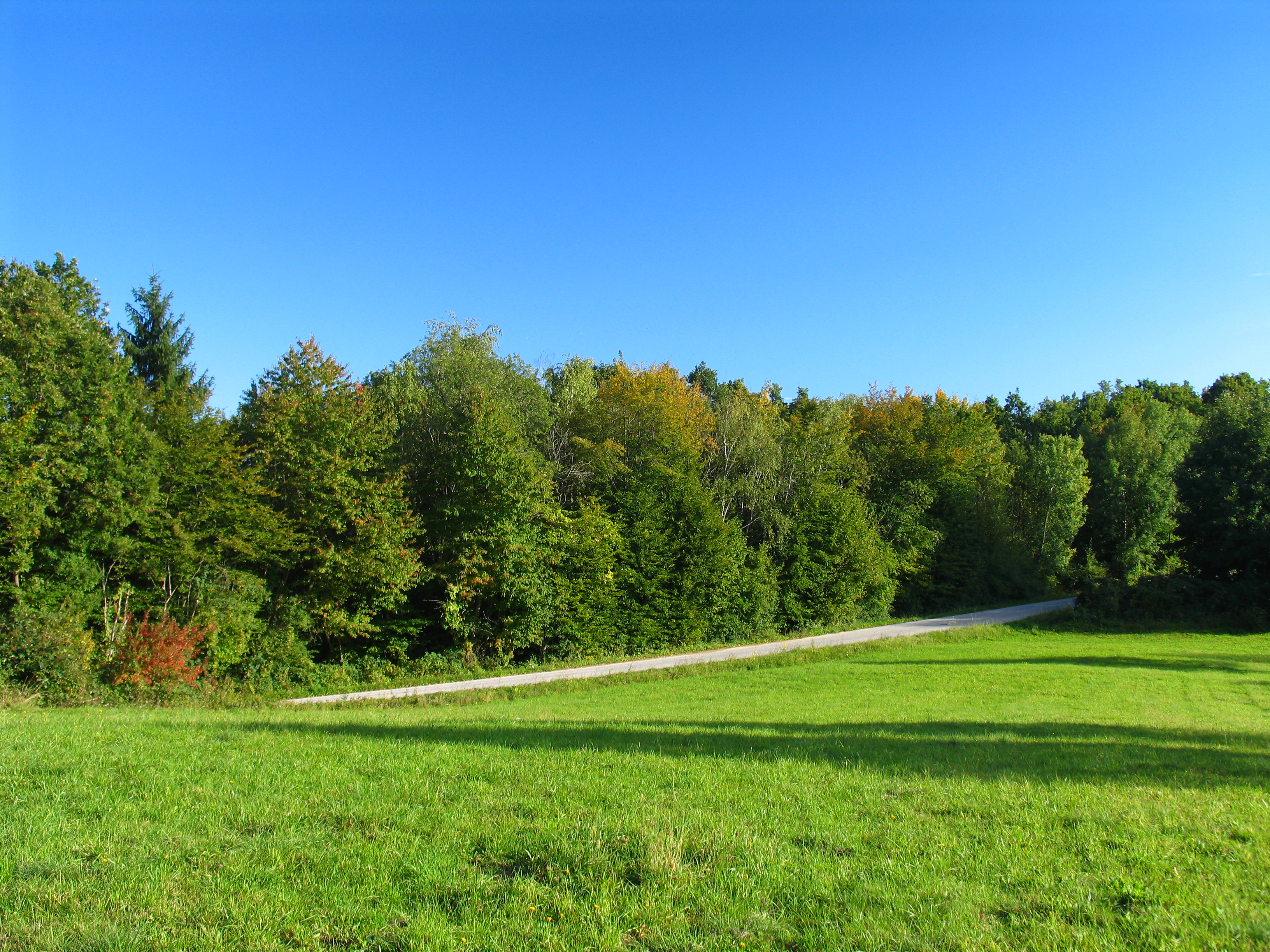 Brkini